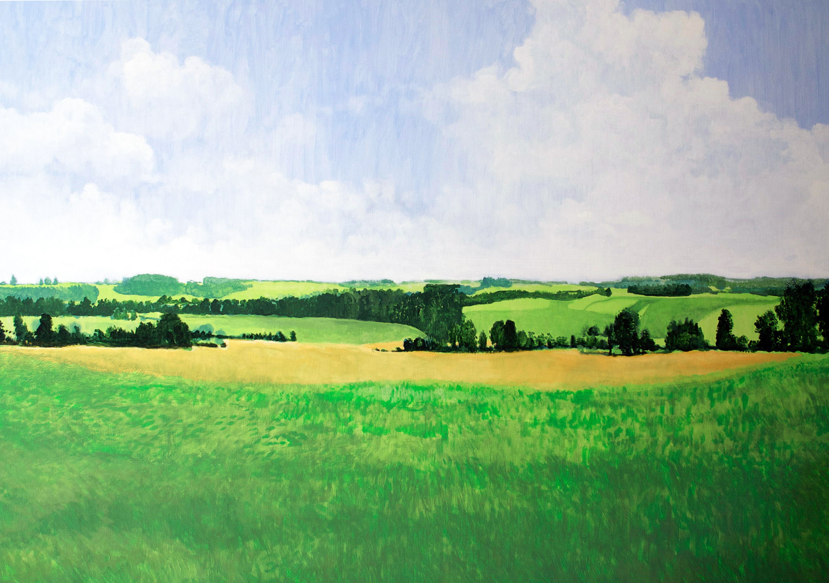 Jean-Marie Biwer: «Grand Paysage», 2015.